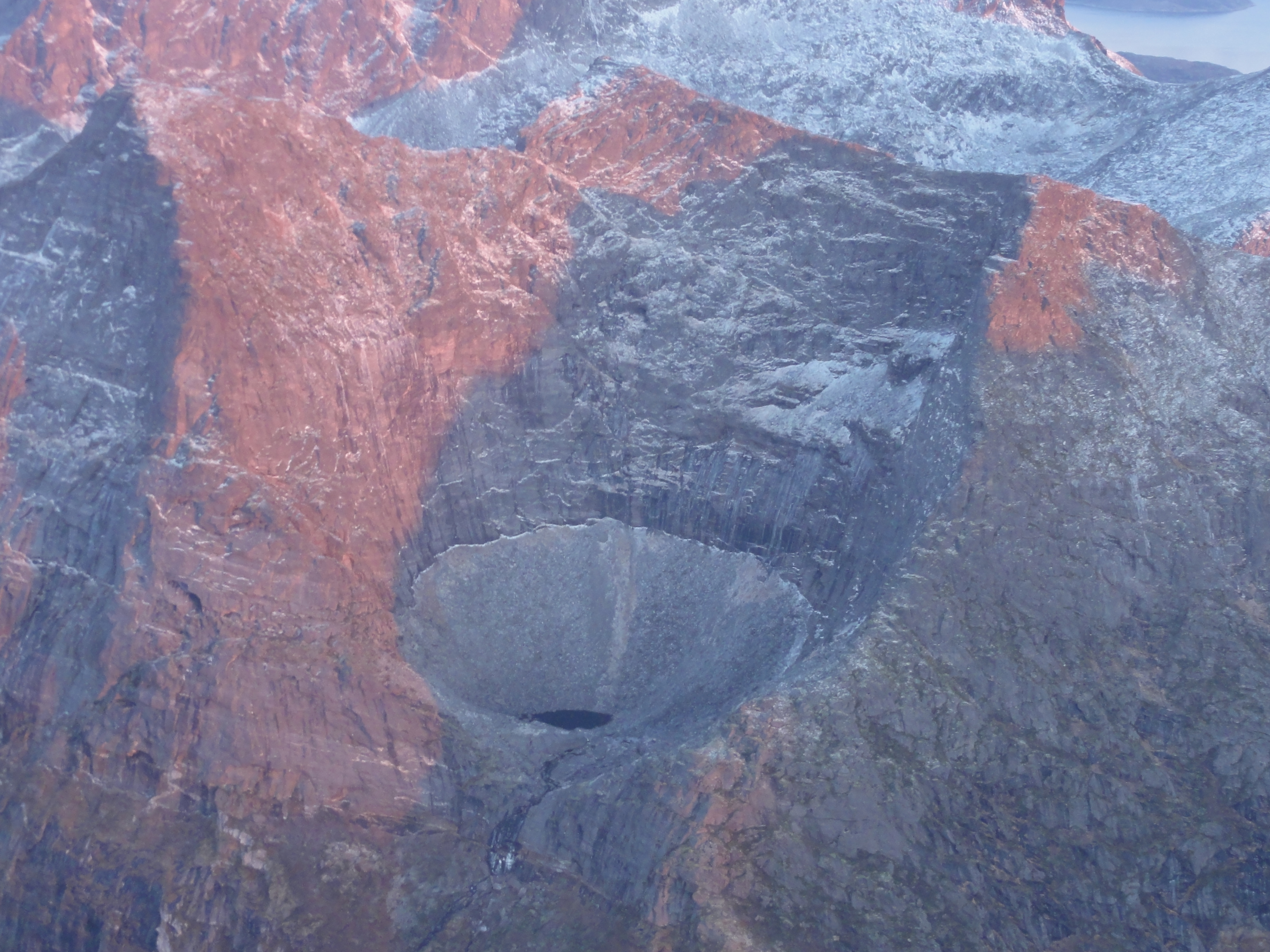 Boten ved Stortinden i Steigen kommune Nordland